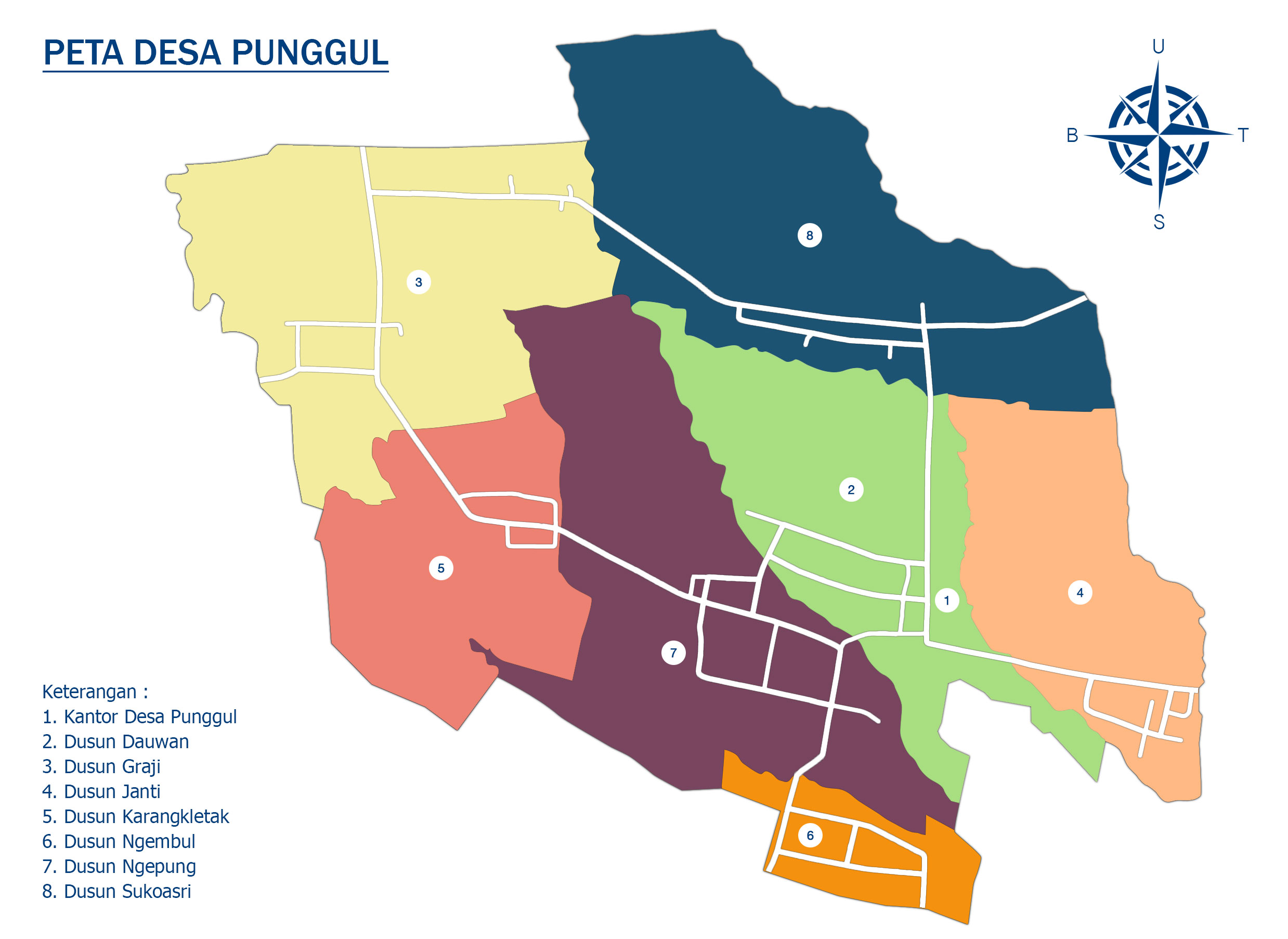 Peta Desa Punggul, Kecamatan Dlanggu, Kabupaten Mojokerto